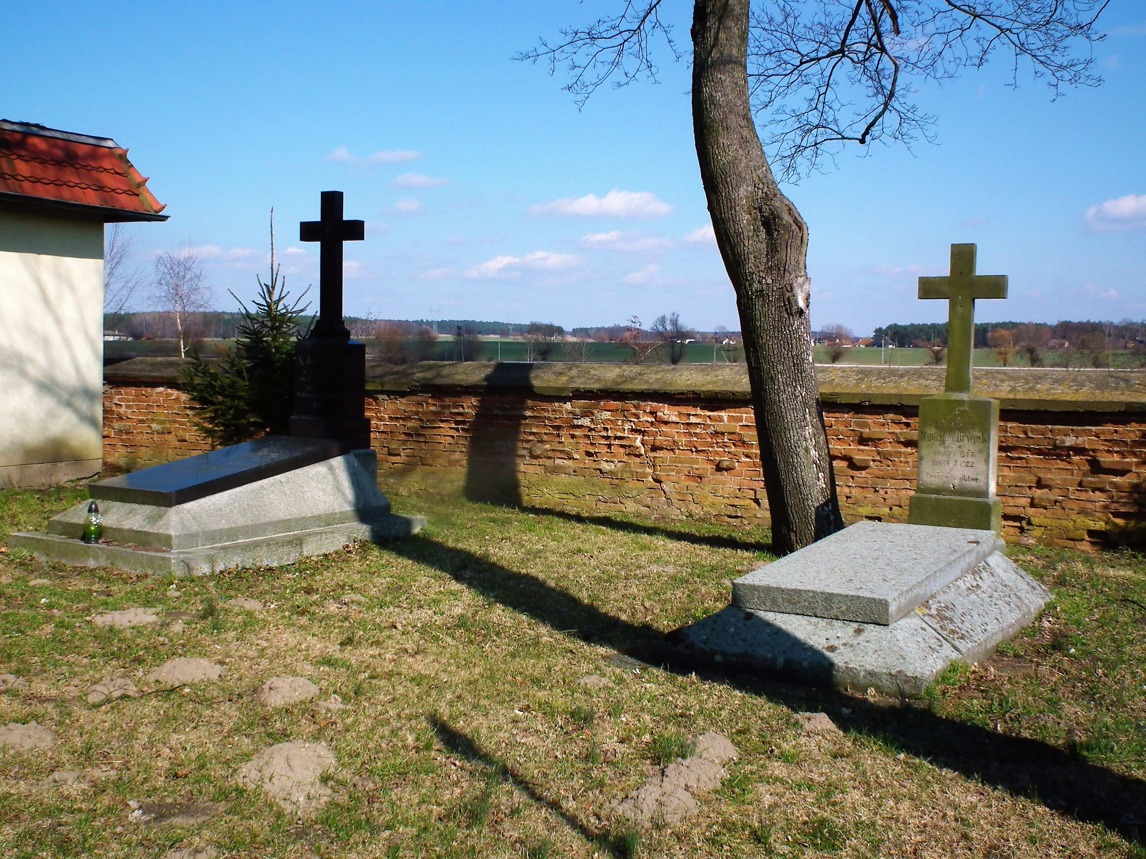 Kościół św. Mikołaja w Siedlcu w gm. Kostrzyn Wlkp.